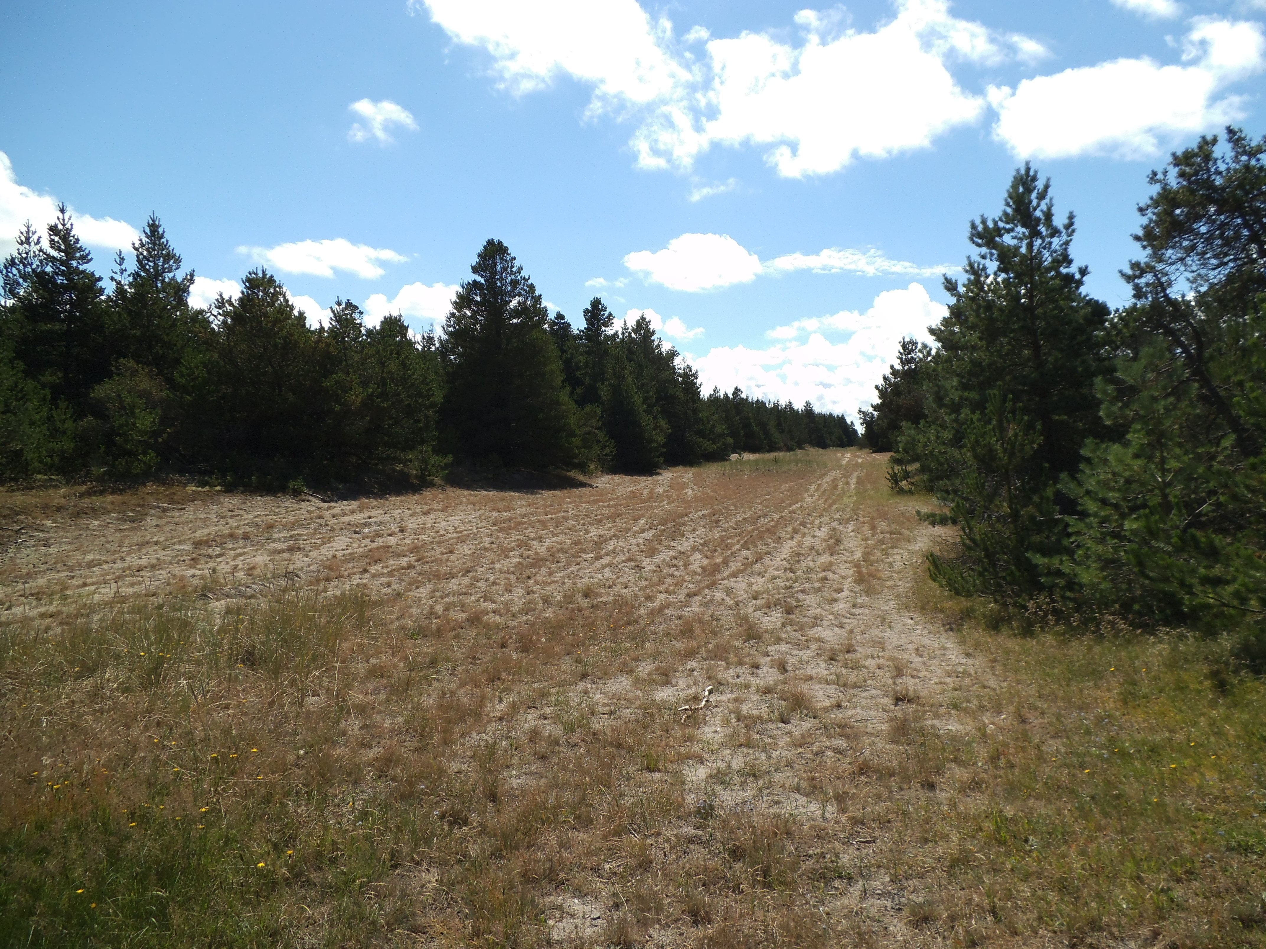 Et forberedt brandbælte i Husby Klitplantage, juli 2016